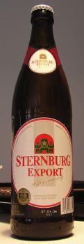 eine 0,5l Flasche Sternburg Export